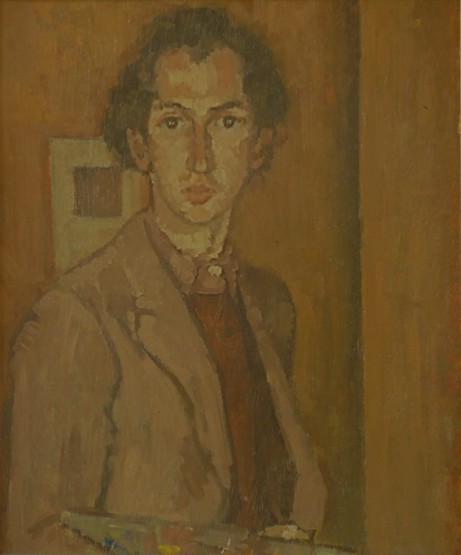 Simon Fuhrer, Selbstbildnis mit Palette; Oel auf Holz; 30 x 25 cm